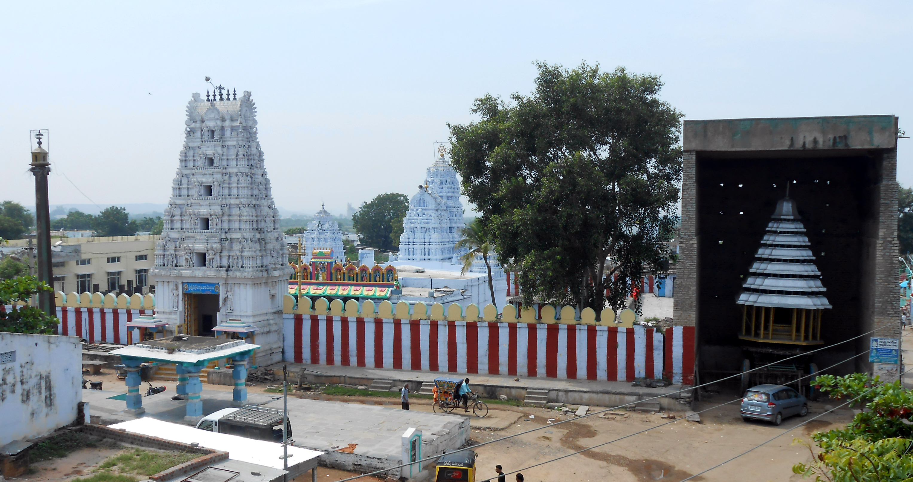 శ్రీ లక్ష్మీ చెన్నకేశవ స్వామి దేవాలయం బ్రహ్మనాయుడు చే 12 వ శతాబ్ధంలో పునర్మించబడినదె.